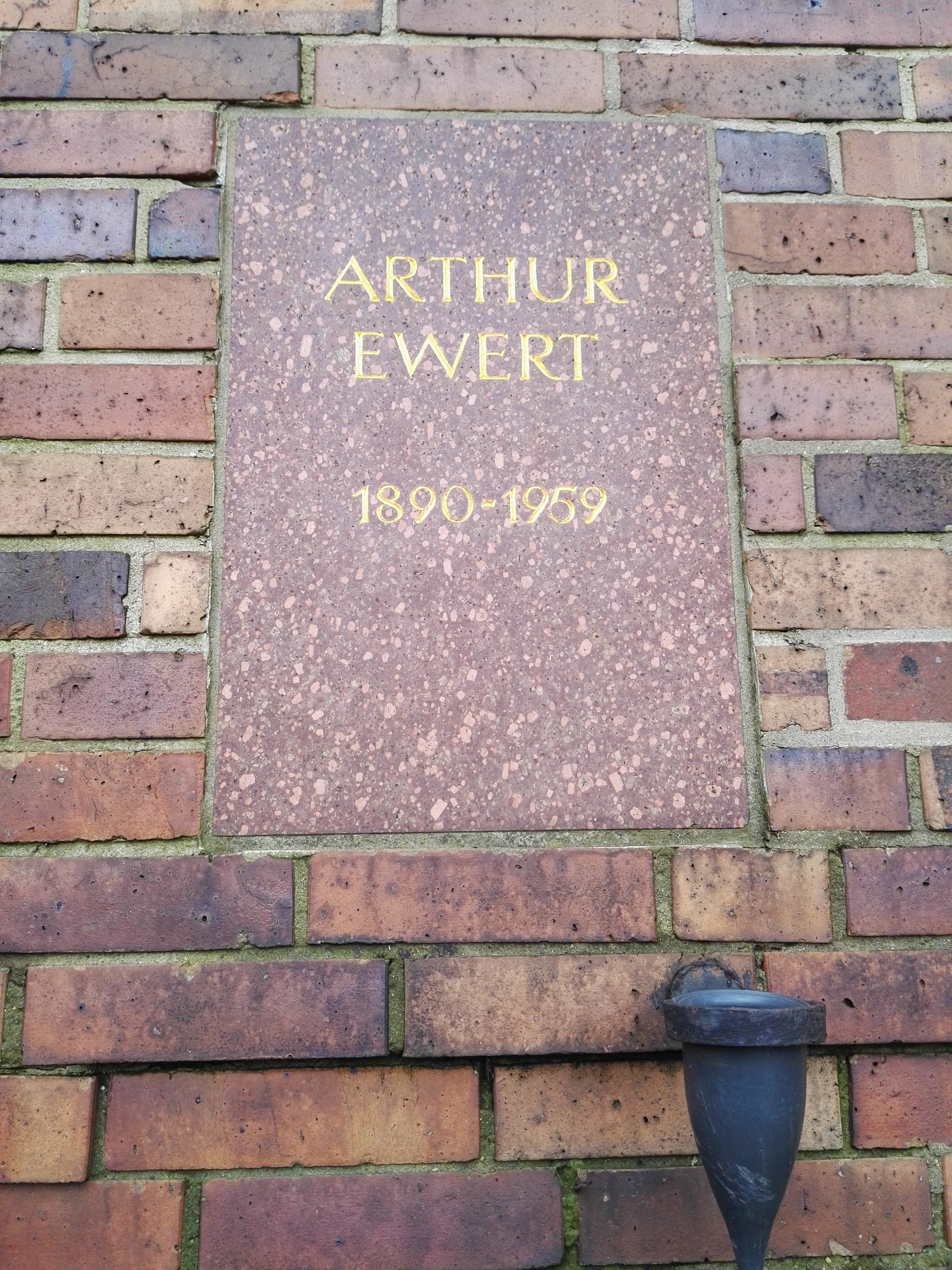 Grab von Arthur Ewert in der Gedenkstätte der Sozialisten auf dem Zentralfriedhof Friedrichsfelde in Berlin-Lichtenberg